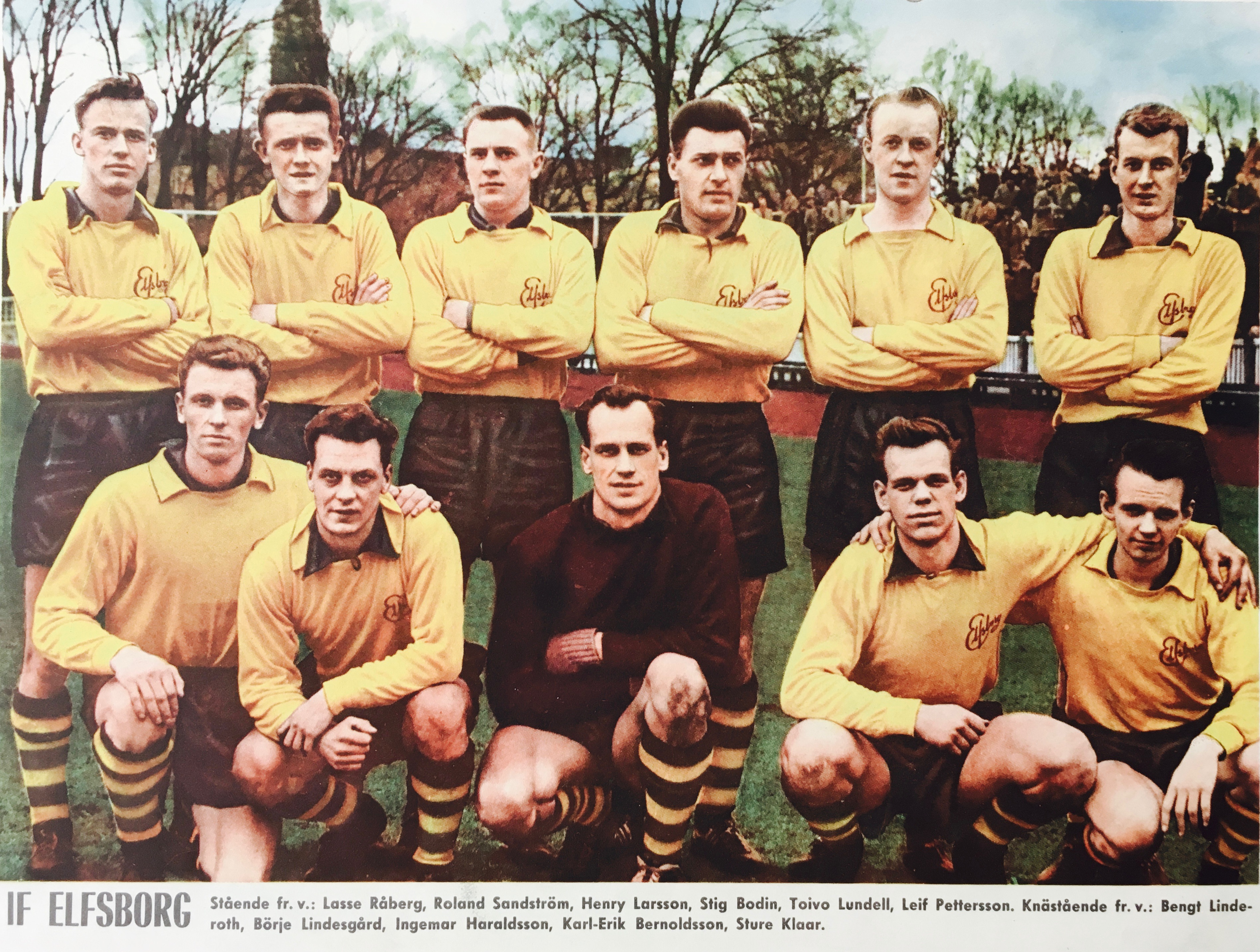 Rekord-Magasinet nr 23, 1959